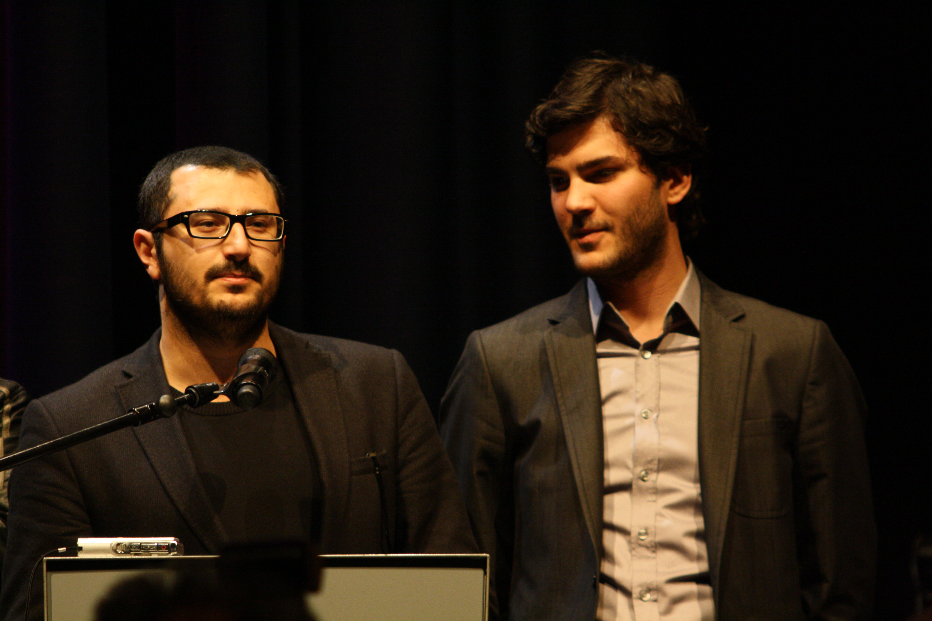 Hasan Tolga Pulat rechts- Regie im Film Wir werden schoene Tage erleben Emre Kavuk links Schauspieler im Film. Nach der Aufführung im Rahmen der Eröffnung der 23. Türkischen Filmtage im Gasteig in München.